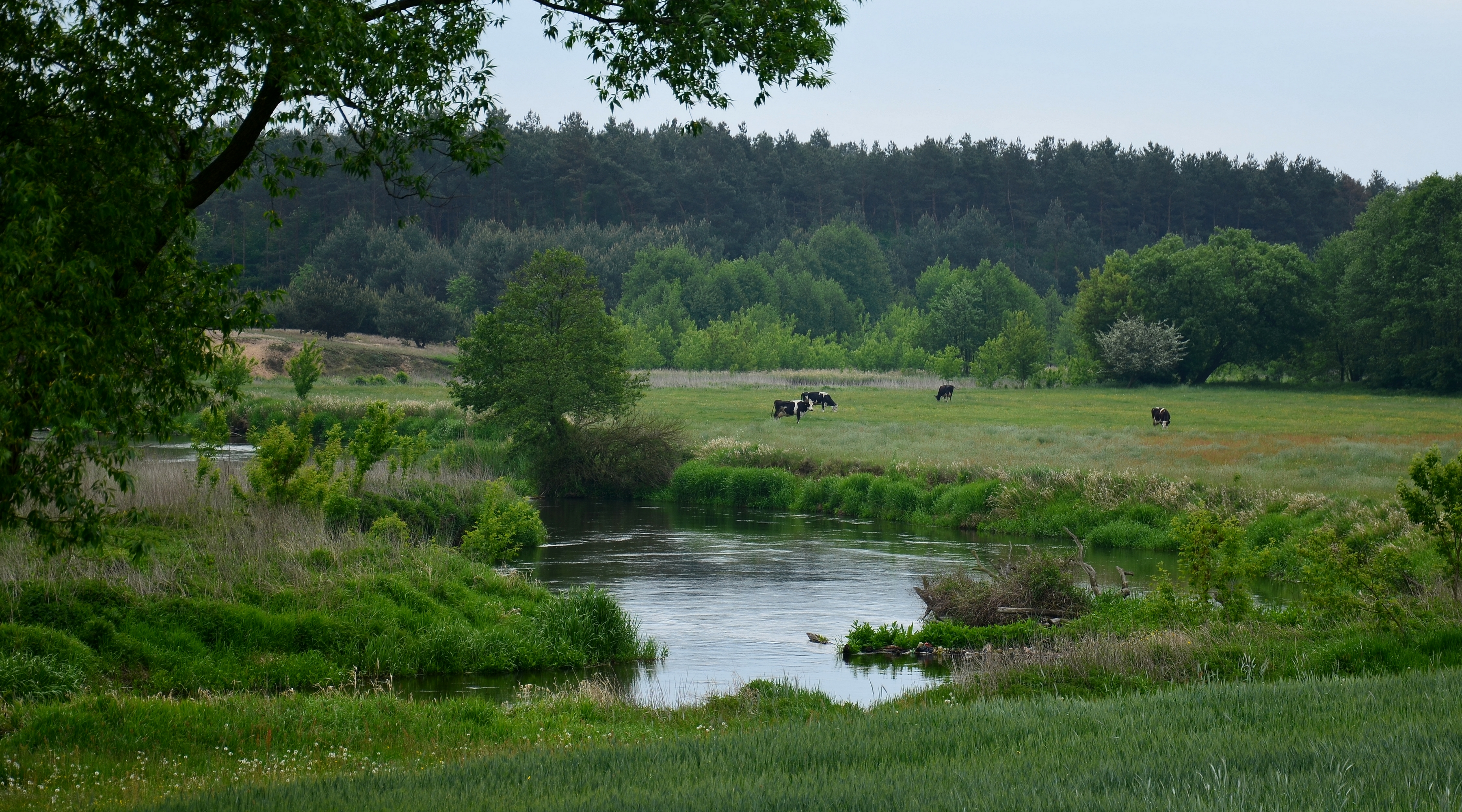 Dolina Drwęcy (PLH280001) – specjalny obszar ochrony siedlisk w ramach programu Natura 2000